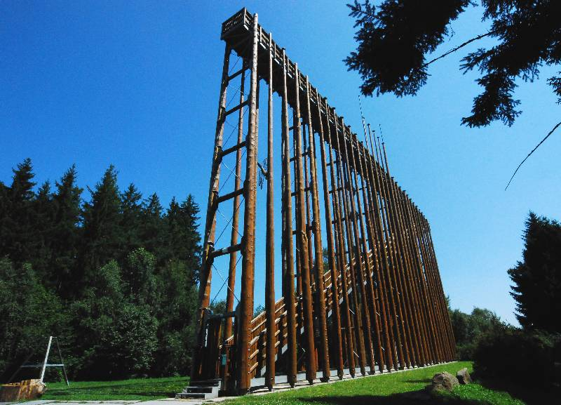 Hölzerne Aussichtsplattform Himmelsleiter bei Schrems (Niederösterreich)